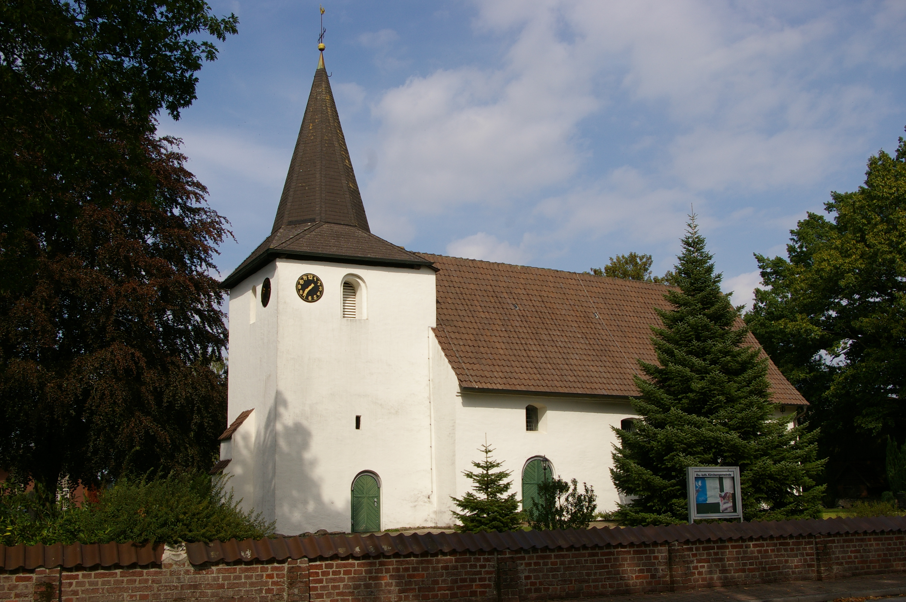 Evangelische Kirche in Schwförden